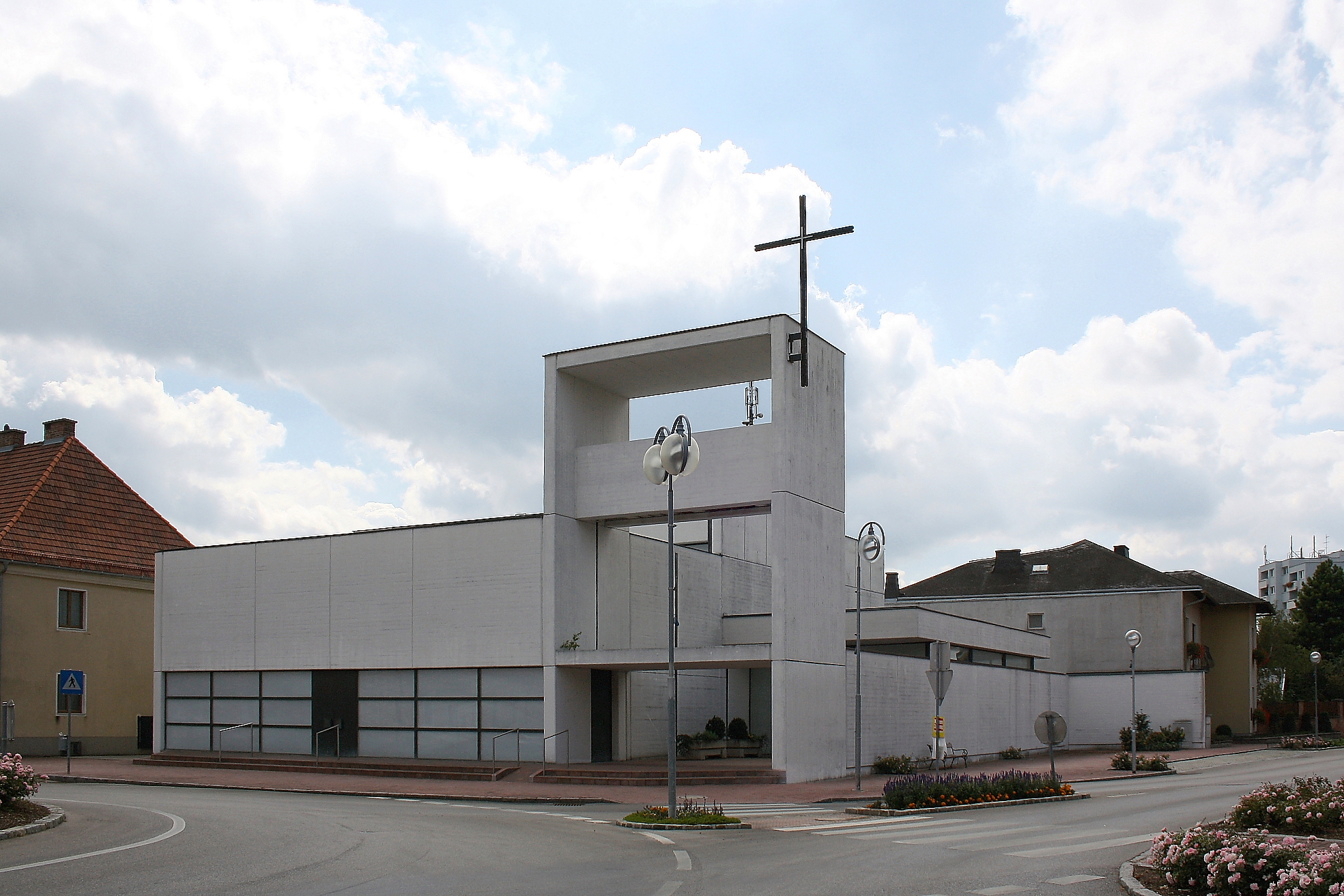 Pfarrkirche von Möllersdorf, ein Ortsteil der niederösterreichischen Stadt Traiskirchen